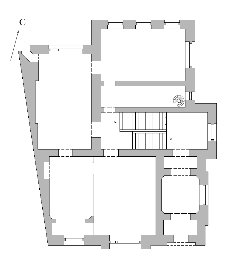 План 1-го этажа дома О. А. Листа в Глазовском переулке (на основе Аренкова Ю. И., Домшлак М. И., Мехова Г. И. и др. Земляной город // Памятники архитектуры Москвы. — М.: Искусство, 1990. — С. 118)